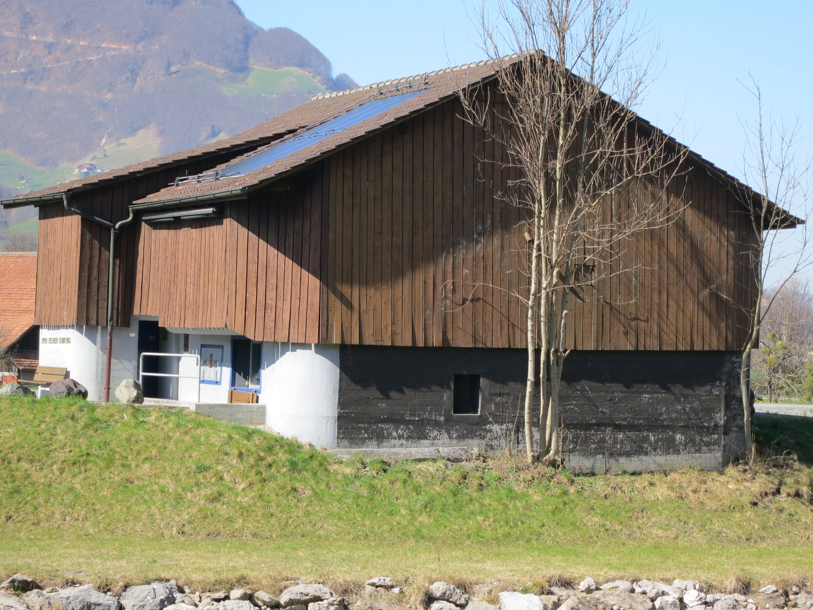 Linth-Escher-Auditiorium, Mollis GL, Schweiz